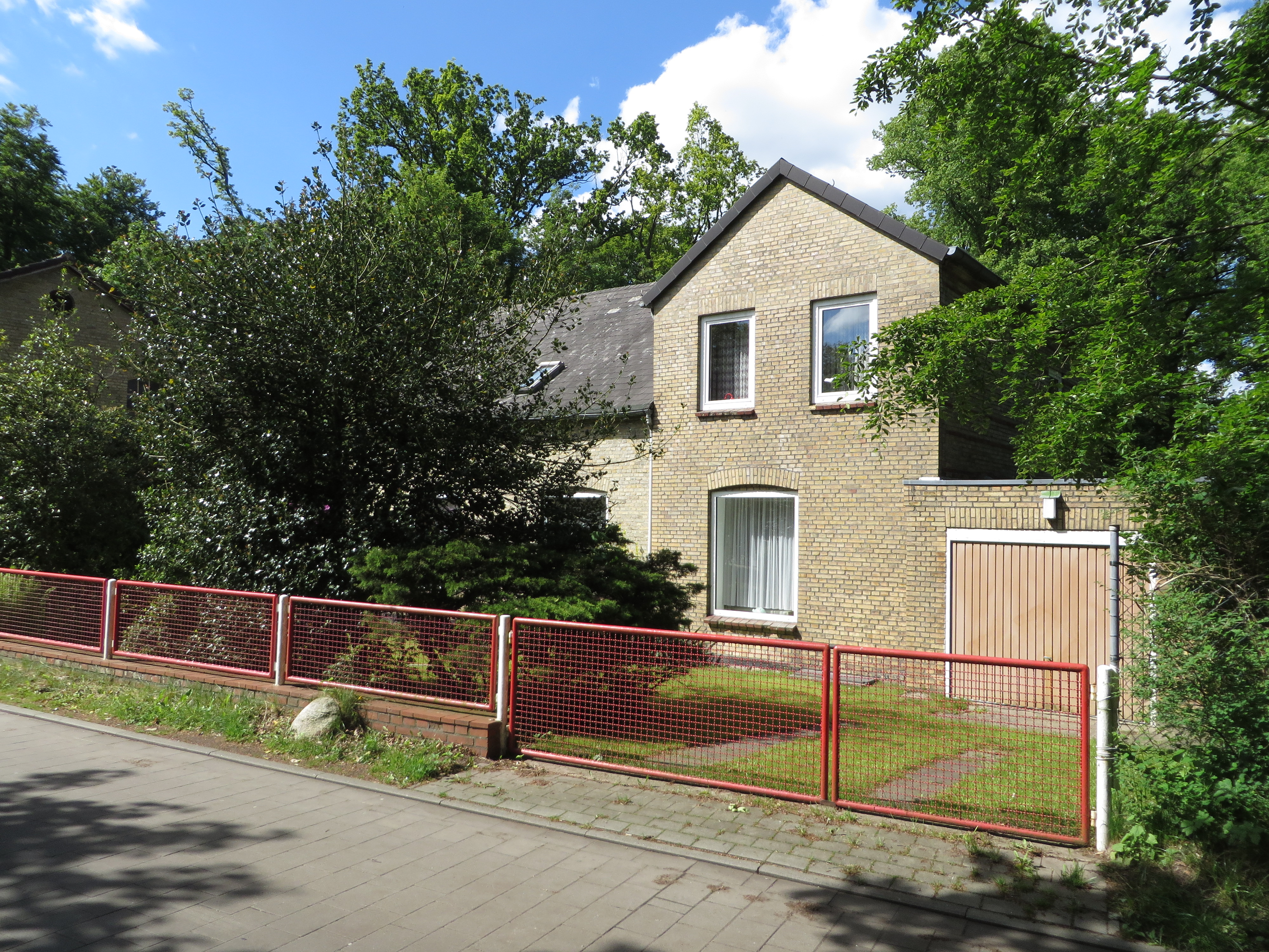 Villa Waldeshöh (Flensburg-Mürwik 4. Juni 2015), Bild 02